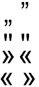 Vrste navodnika. Trebalo mi za ?lanak o istima pa napravih. :-)